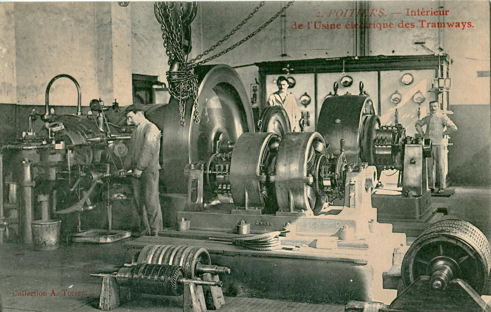 Carte postale ancienne éditée par A. Torren, n°2 : POITIERS - Intérieur de l'Usine électrique des Tramways